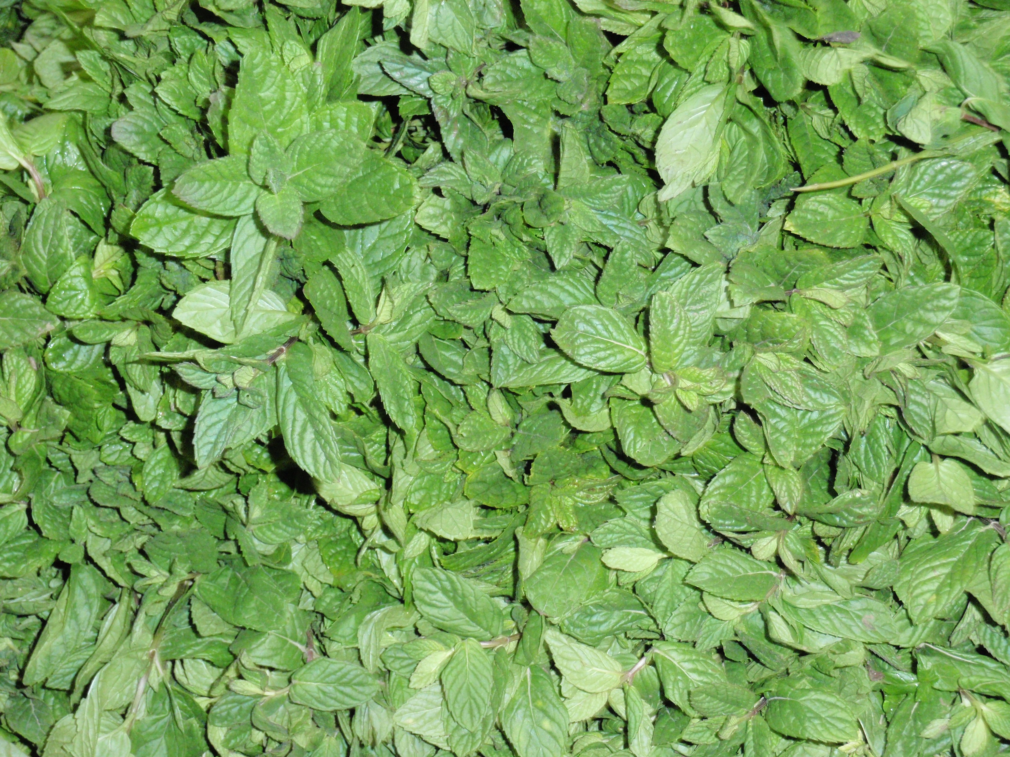 Shuk Hsayarim ירקות בשוק הסיירים